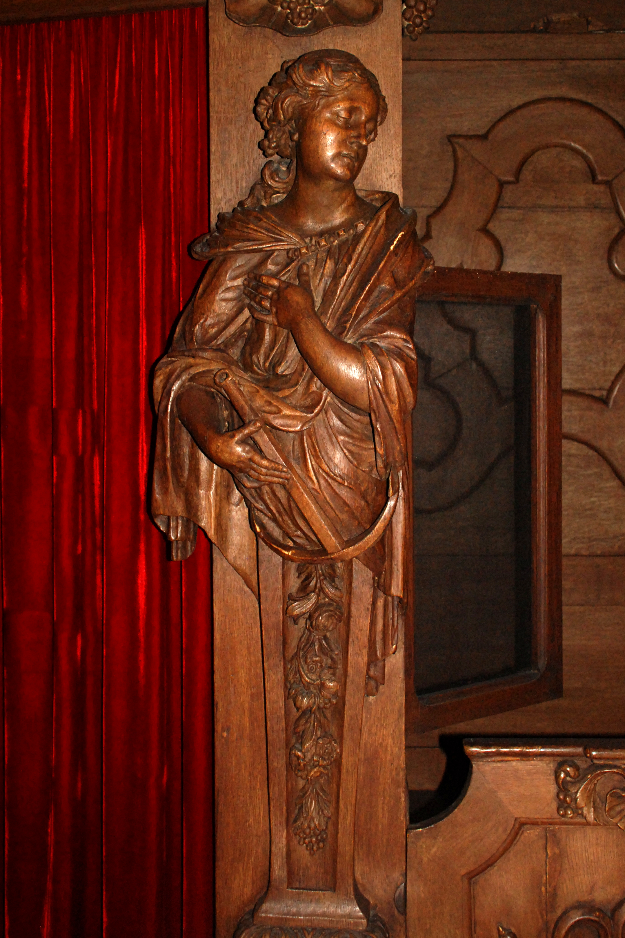 Belgique - Brabant wallon - Ottignies - Église Saint-Rémi - confessionnal : l'Espérance